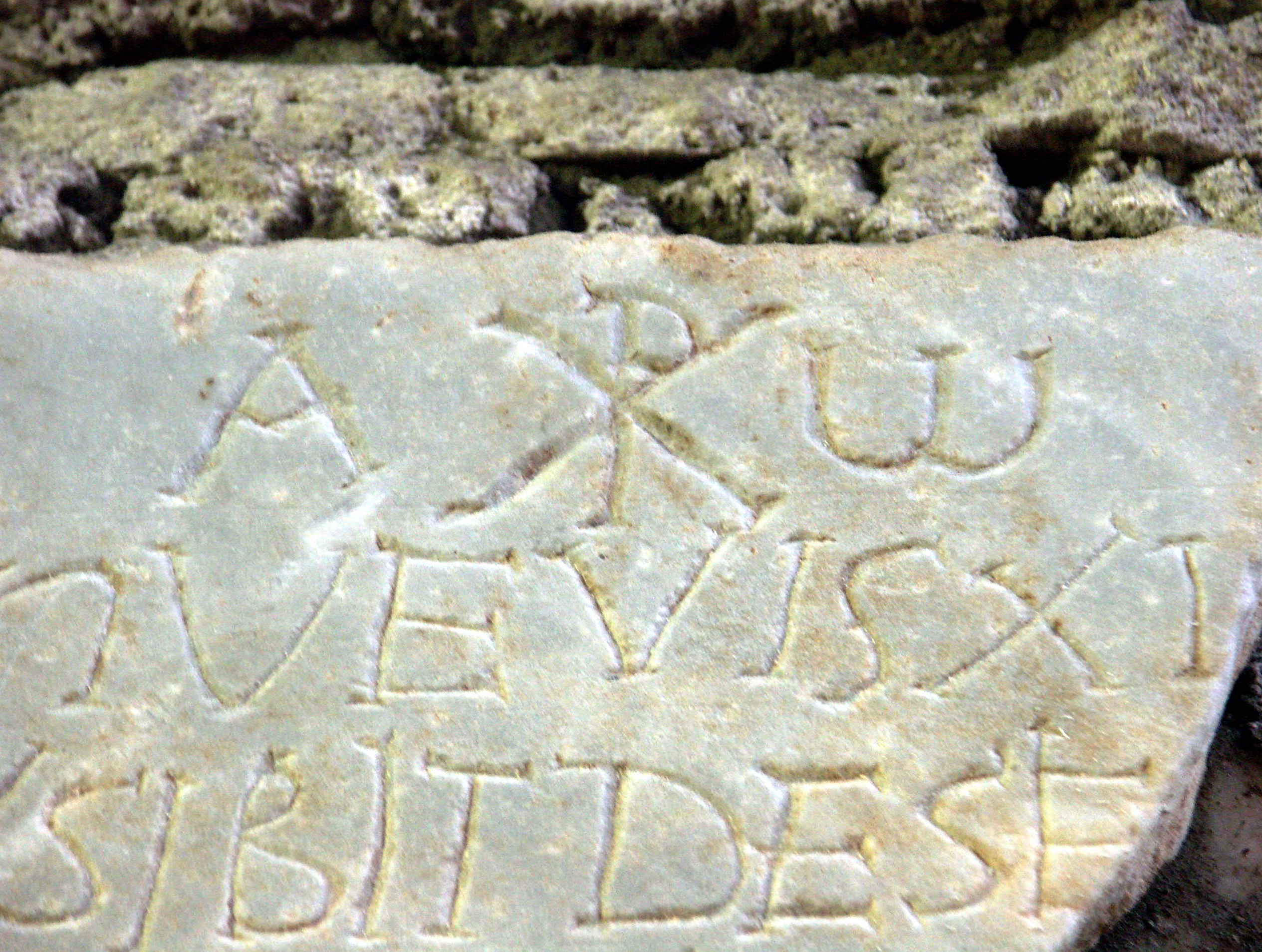 Rom, Domitilla-Katakomben, Steintafel mit Inschrift, Alpha und Omega und Christussymbol "Chi Rho"